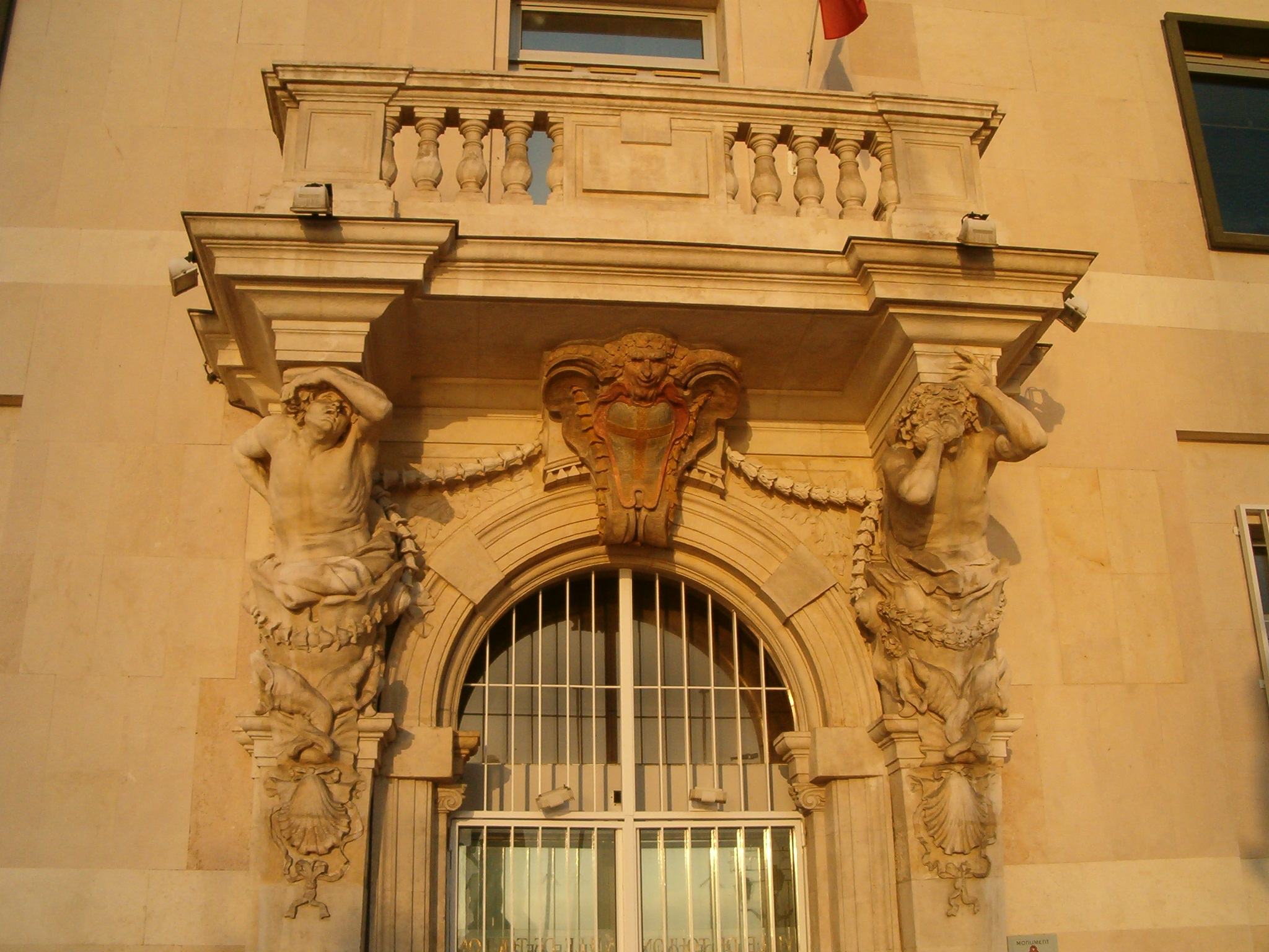 Atlantes de Pierre Puget, Toulon, France